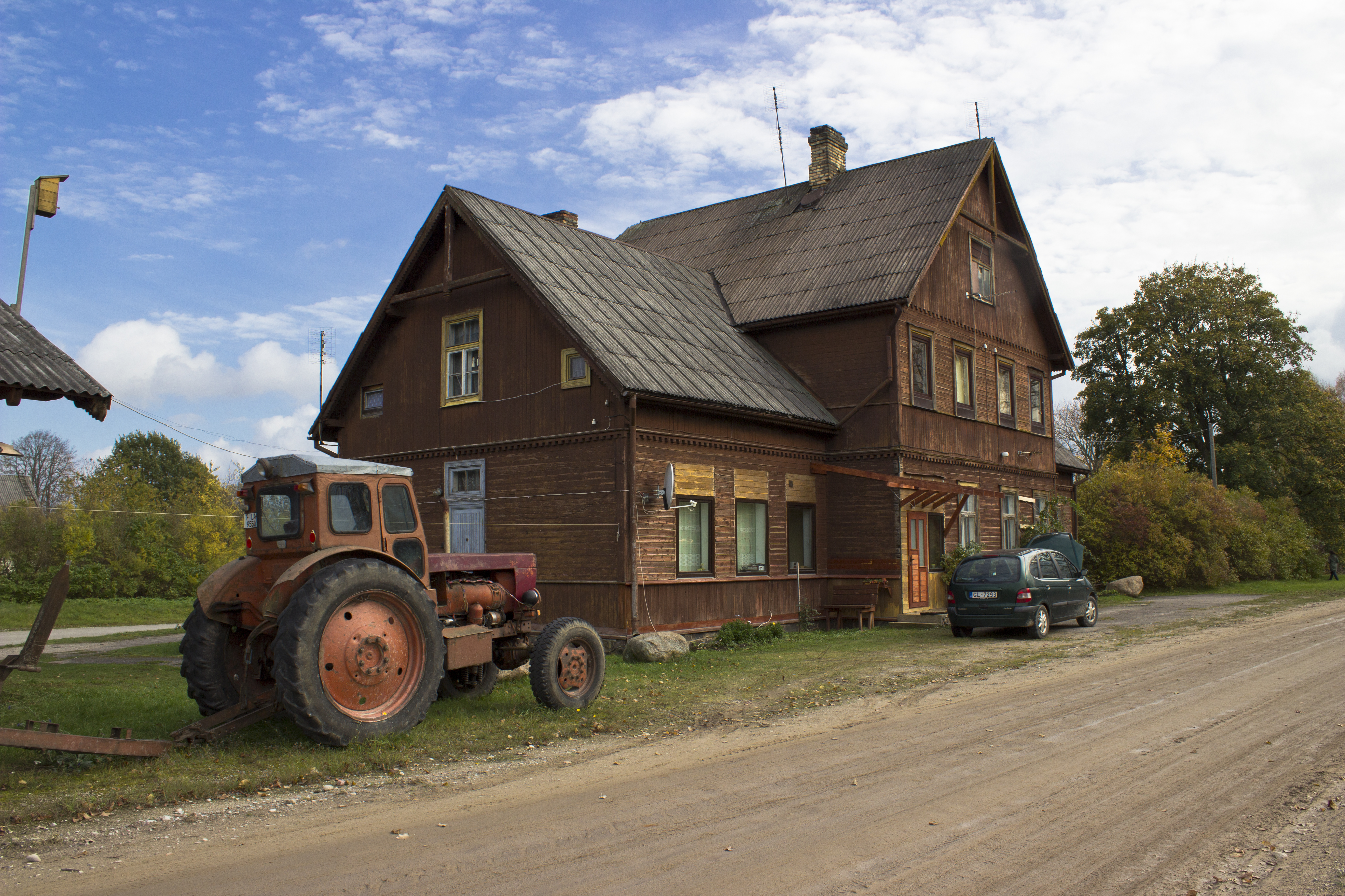 Valdemārpils dzelzceļa stacija